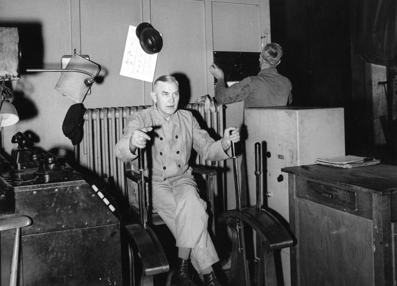 Salzgitter AG Bedienung der Fördermaschinen